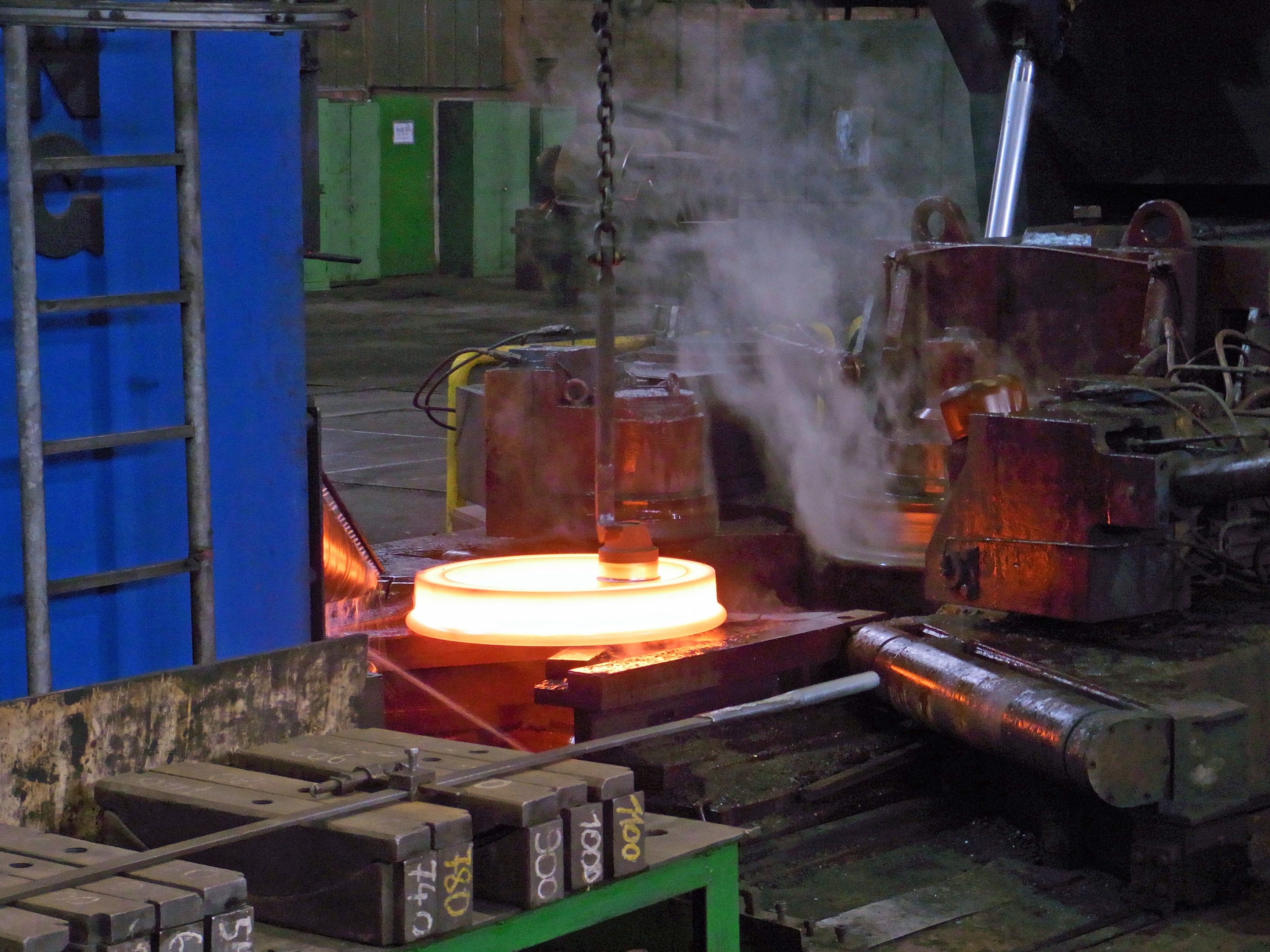 ExtraSchicht 2010 – Radreifenproduktion im Bochumer Verein